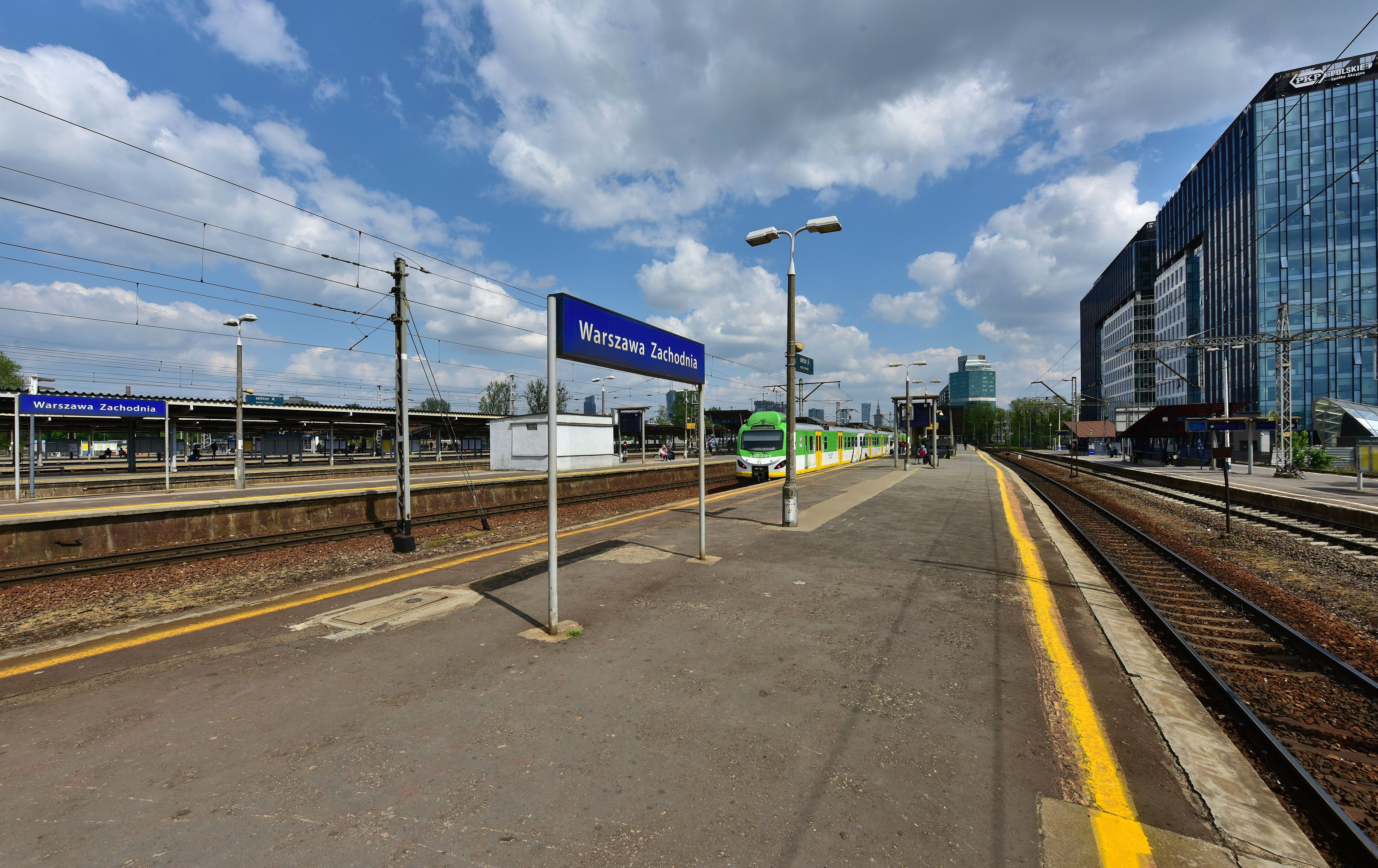 Perony dworca Warszawa Zachodnia